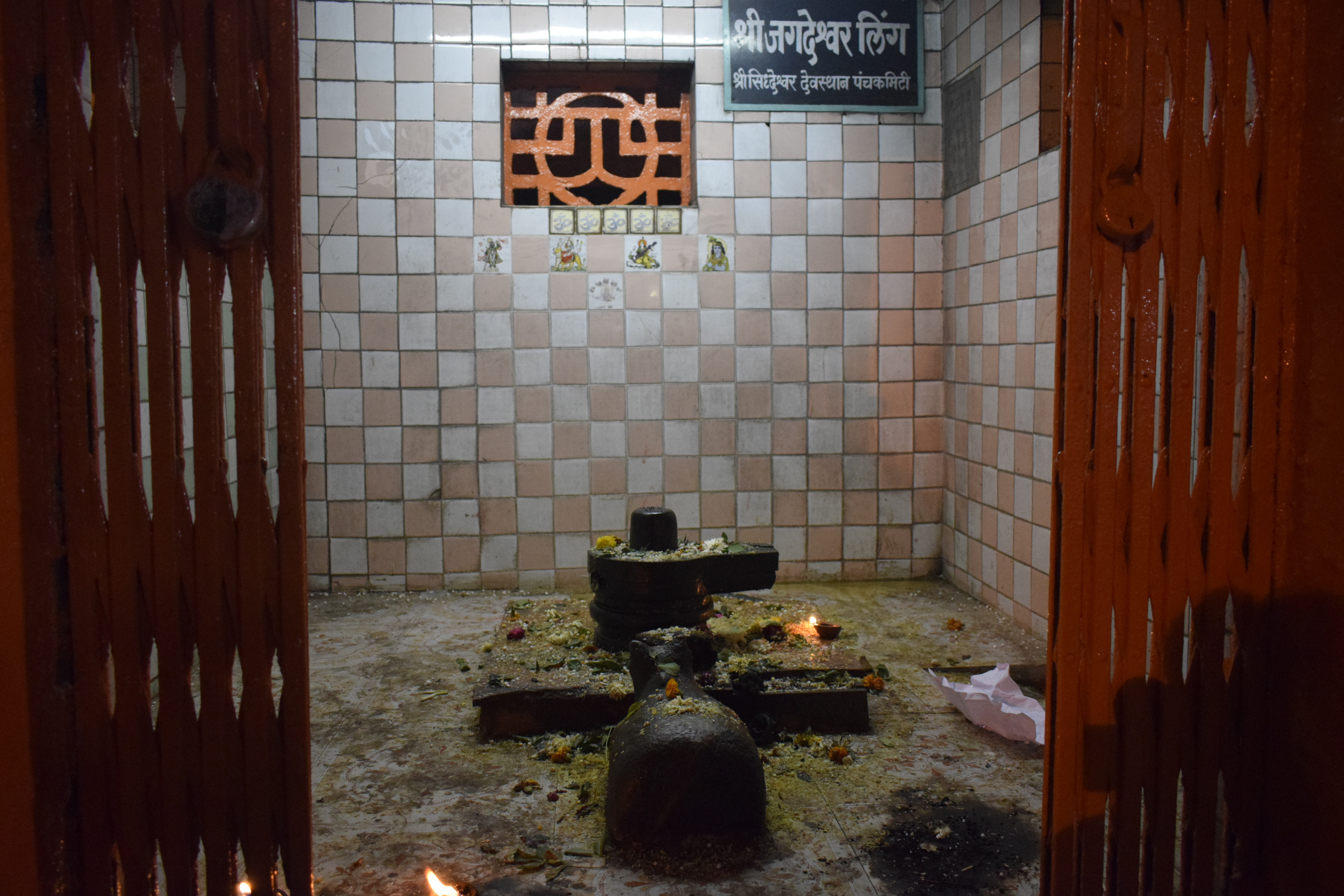 श्री जगदेश्वर लिंग